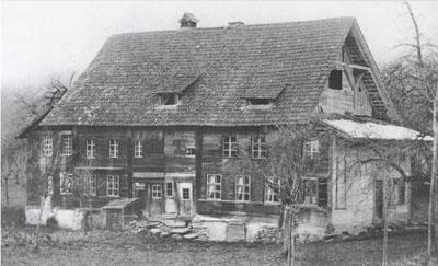 Geburtshaus von Hans Waldmann in Baar ZG, durch Brandstiftung zerstört am 7. Juni 1893.